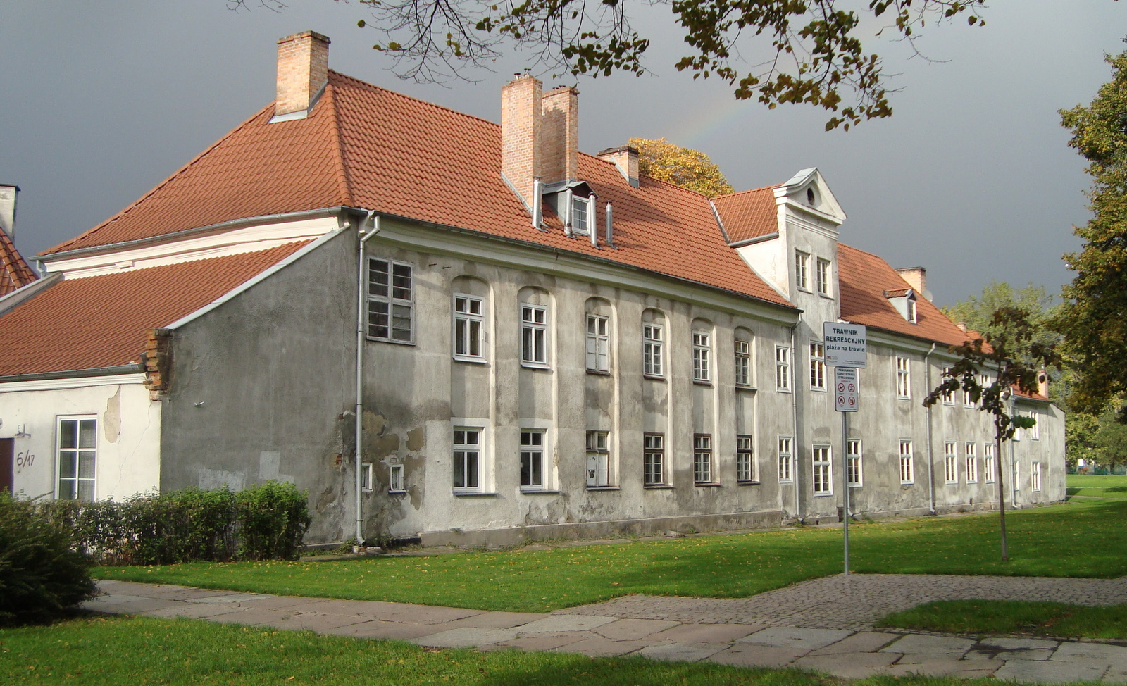 Gdańsk Zamczysko - Dom Dziękczynności (dawny sierociniec - obecnie budynek mieszkalny)